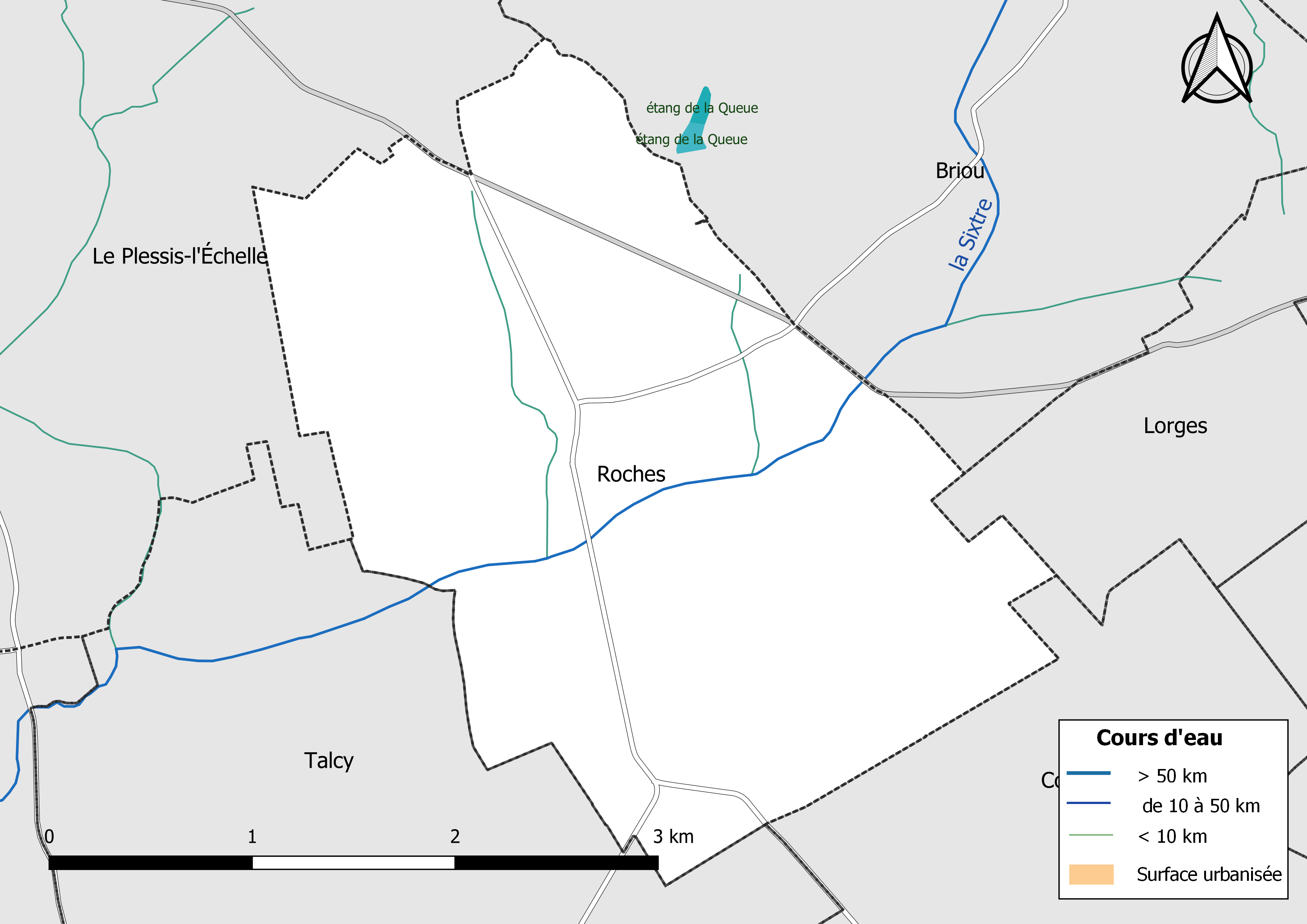 Carte du réseau hydrographique de la commune de Roches (Loir-et-Cher) (France).